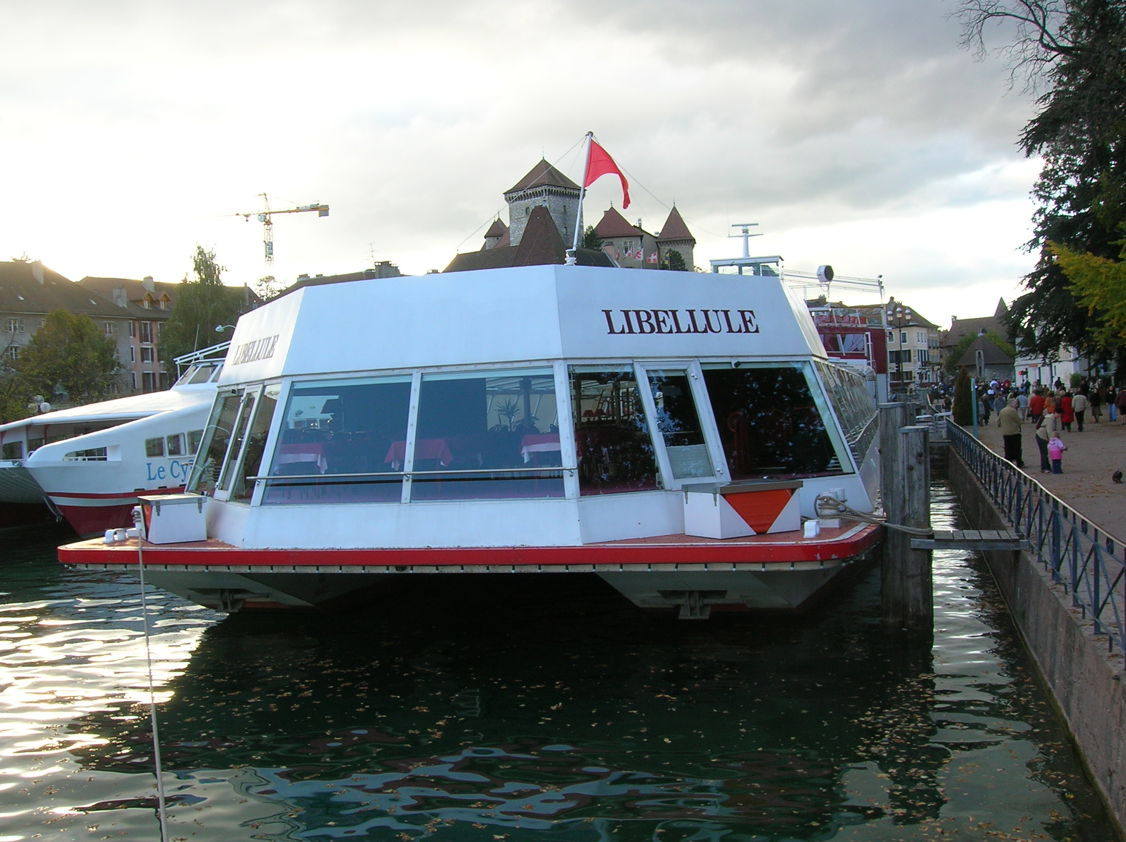 Bateau "Le Libellule", lac d'Annecy, France